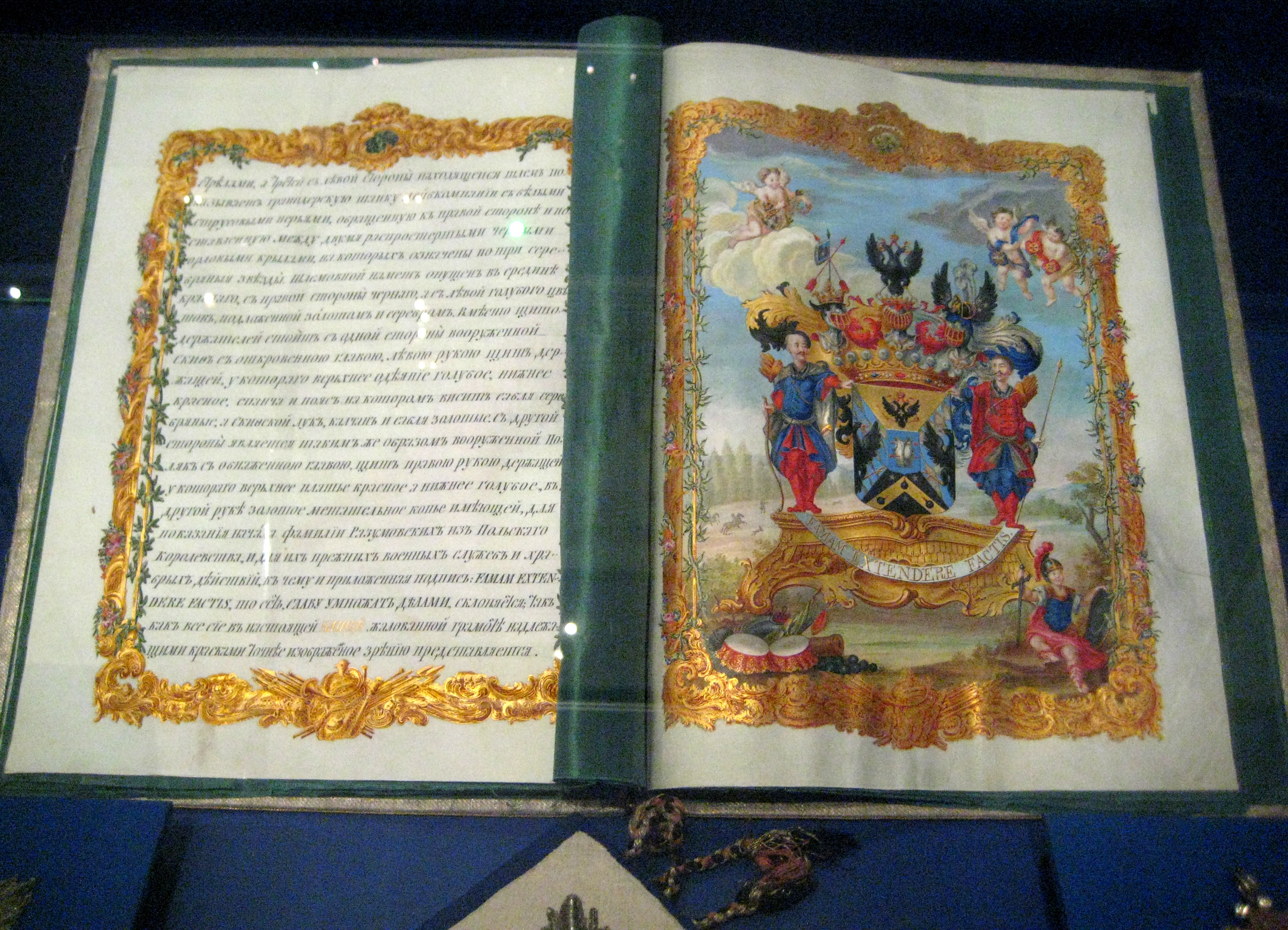 Жалованная грамота императрицы Елизаветы Петровны Алексею Григорьевичу Разумовскому на графское достоинство Российской империи достоинство и герб. 1 марта 1751 года. Санкт-Петербург. Рукопись 18 века. ГИМ